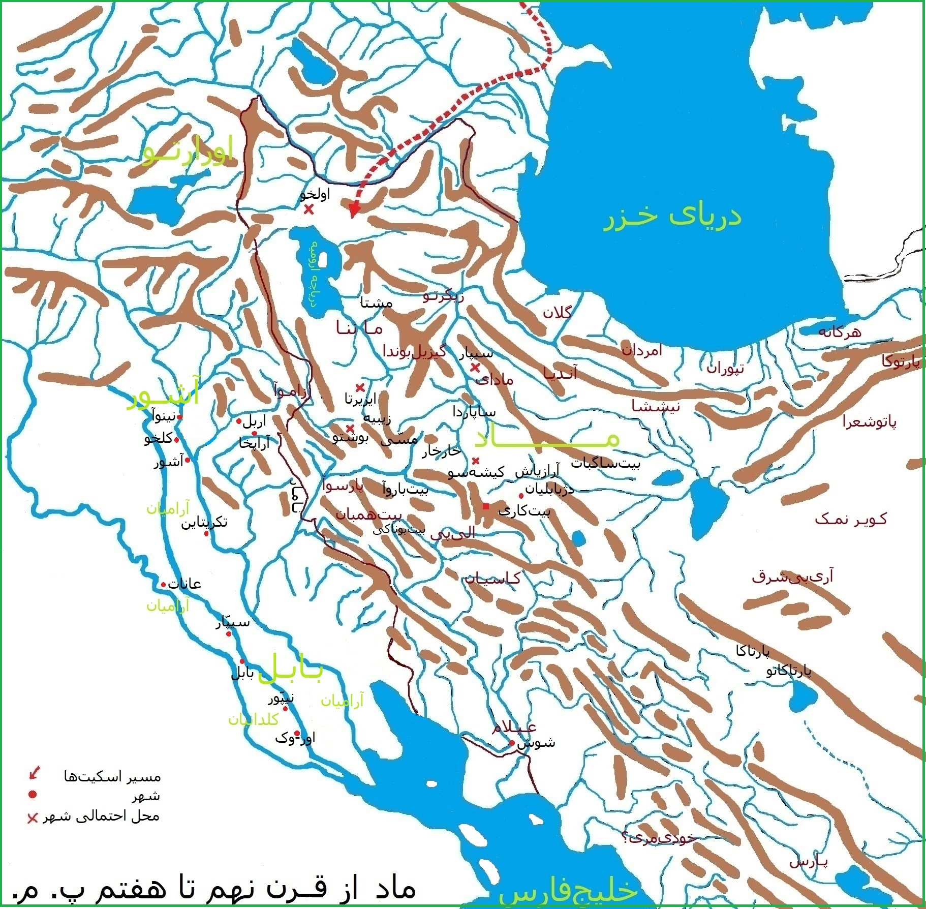 ماد در قرن‌های نهم تا هفتم پیش از میلاد